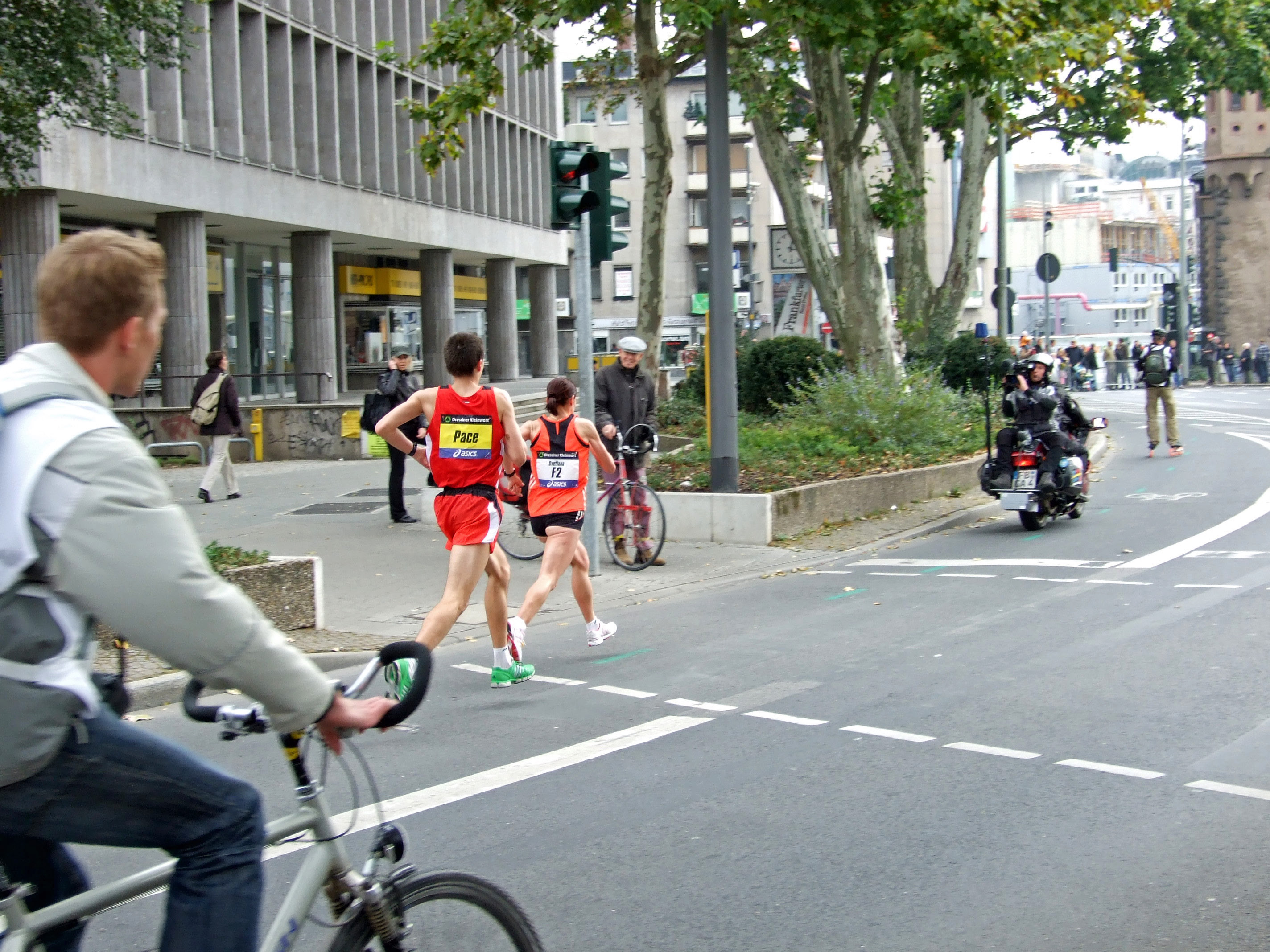 Die Spitze der Frauen mit der (hier noch führenden) Läuferin, Svetlana Zakharova, ca. 3 km vor dem Ziel beim Frankfurt-Marathon, 2007 in Ffm